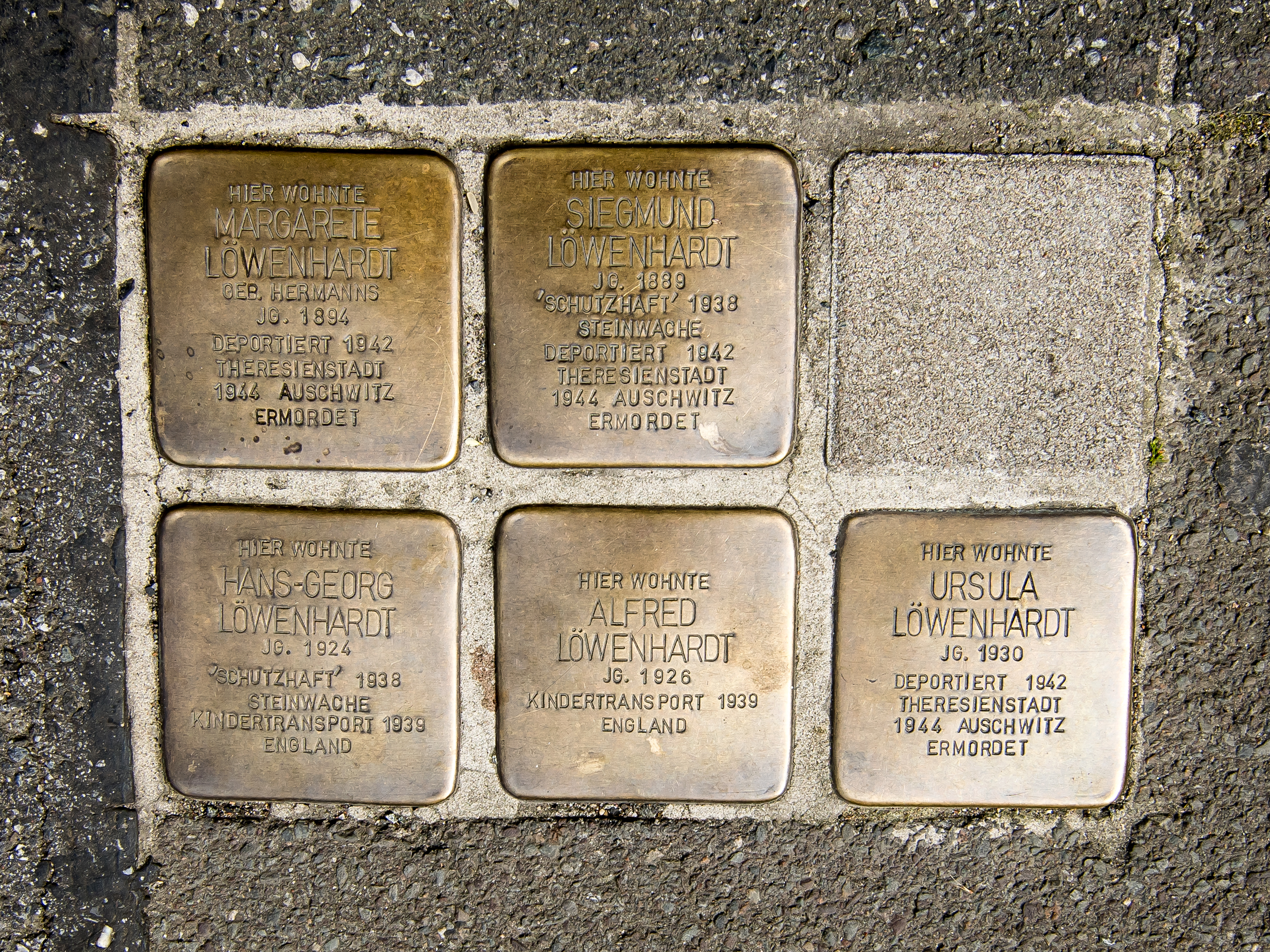 Stolpersteine Familie Löwenhardt in Dortmund